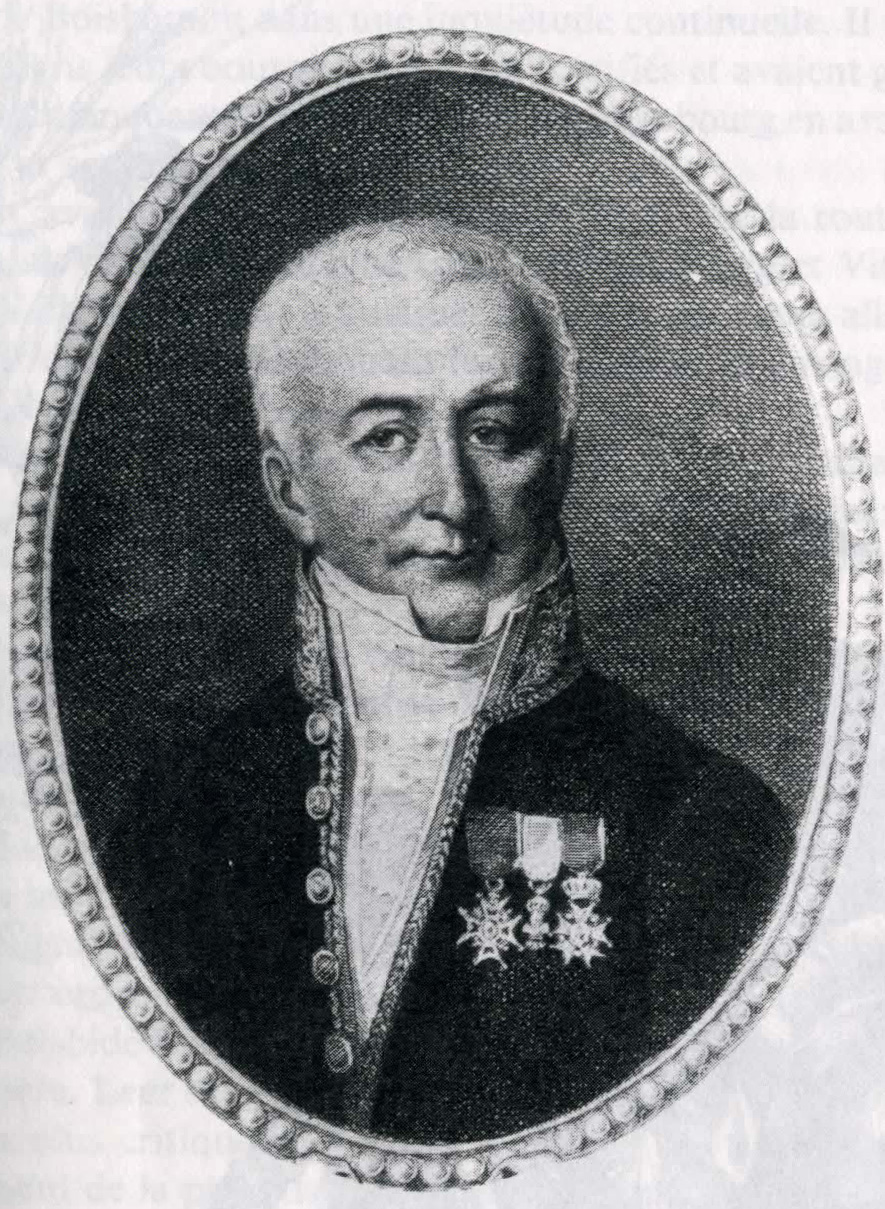 Henri du Boishamon (1776-1846)